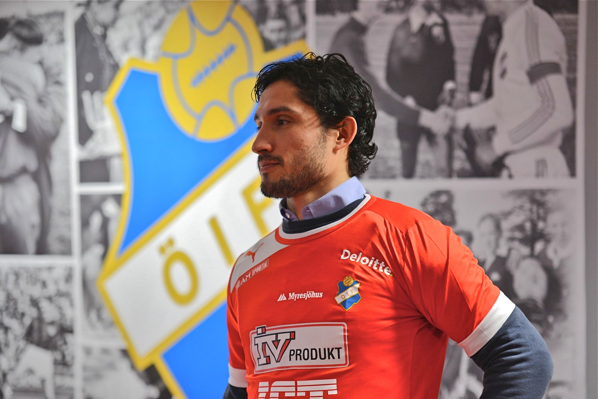 Pablo Pinones Arce presenteras som Östers IF:s nya anfallare.